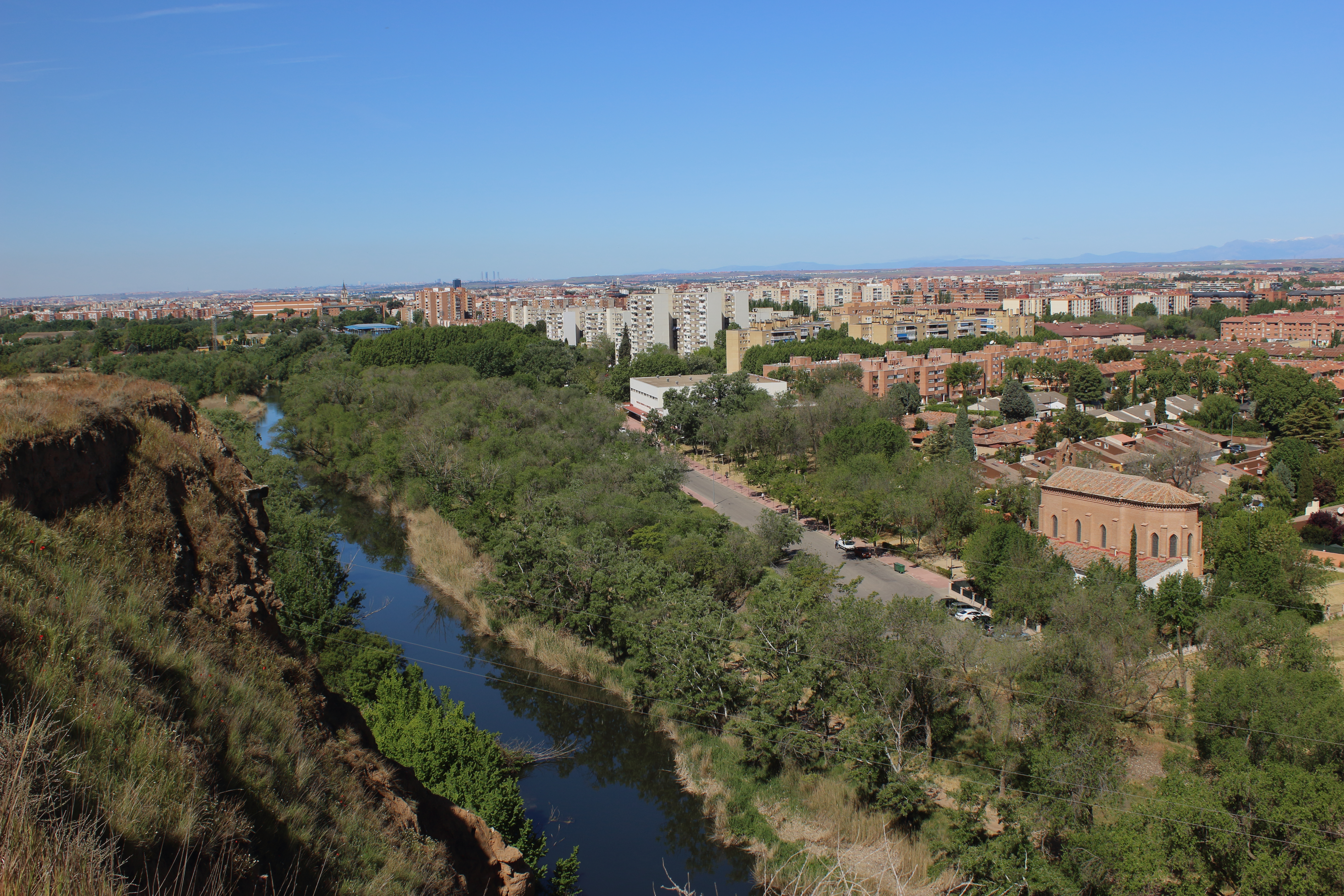 Cuencas de los ríos Jarama y Henares This is a photography of a Site of Community Importance in Spain with the ID: ES3110001. Natura2000 entry, EEA entry